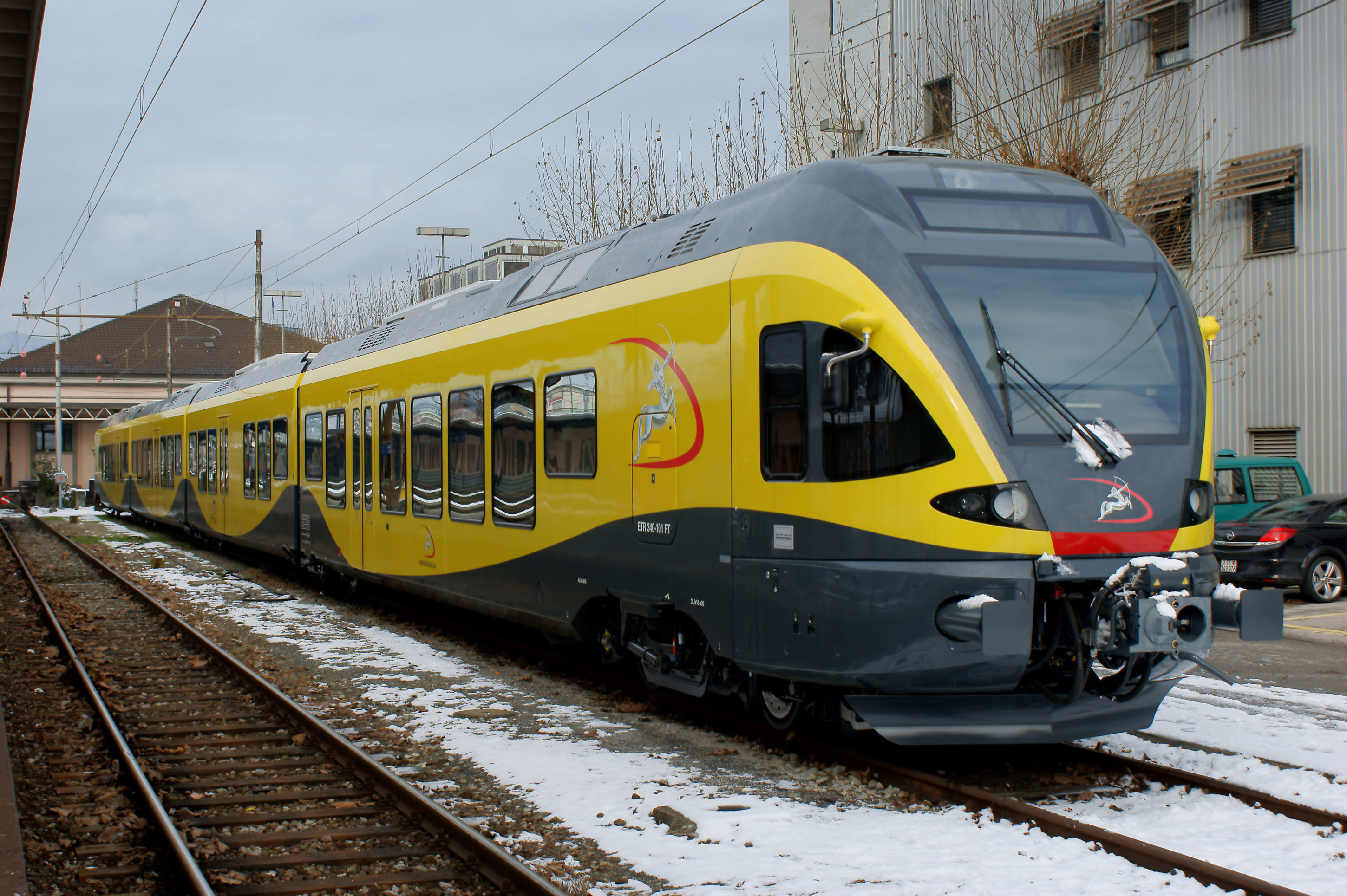 Stazione di Chiasso...un Flirt della Ferrotramviaria (FT) SPA, in sosta al binario 13 in attesa del trasferimento a Bari.